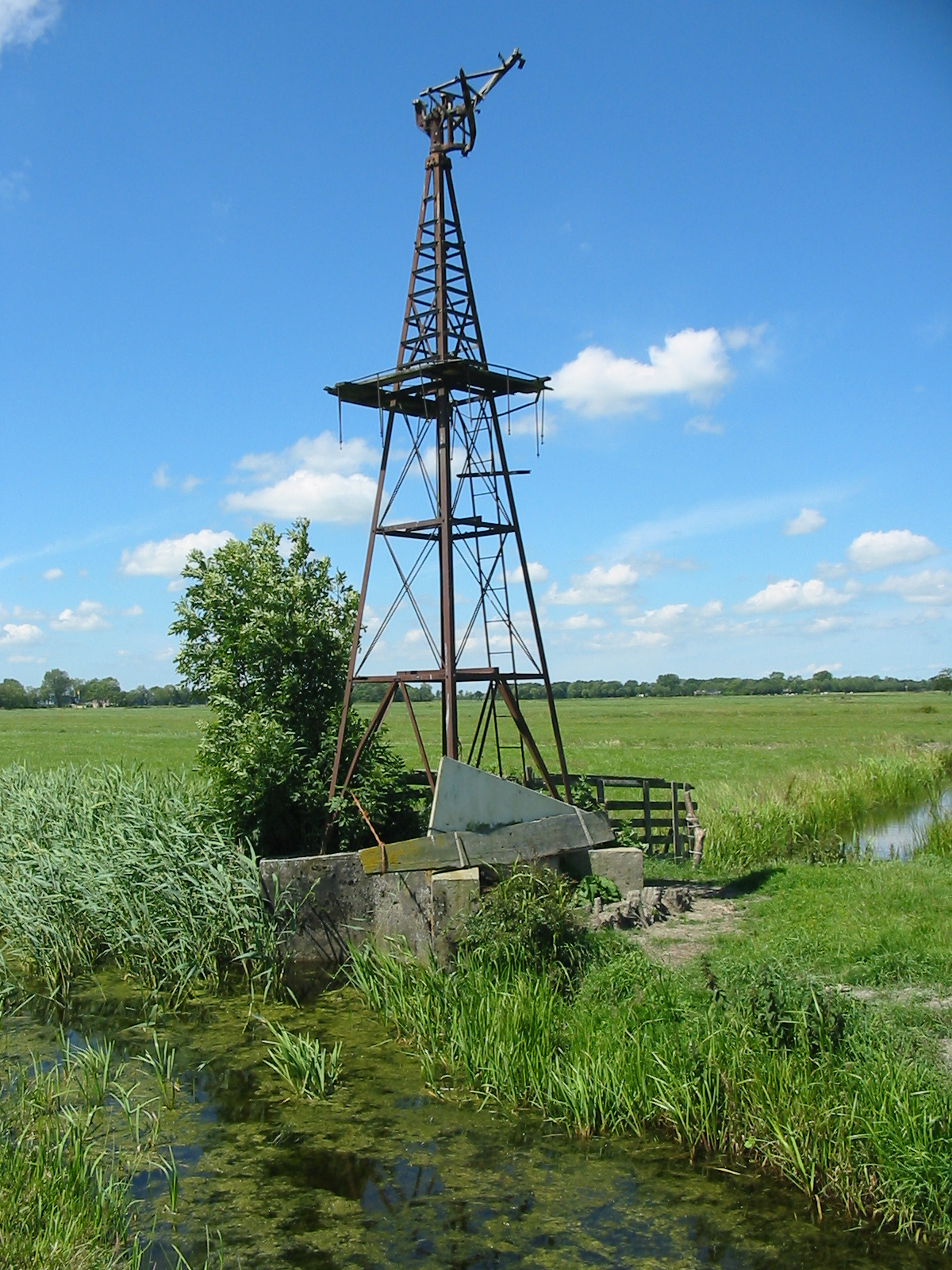 Goutum Windmotorrestant Waldwei